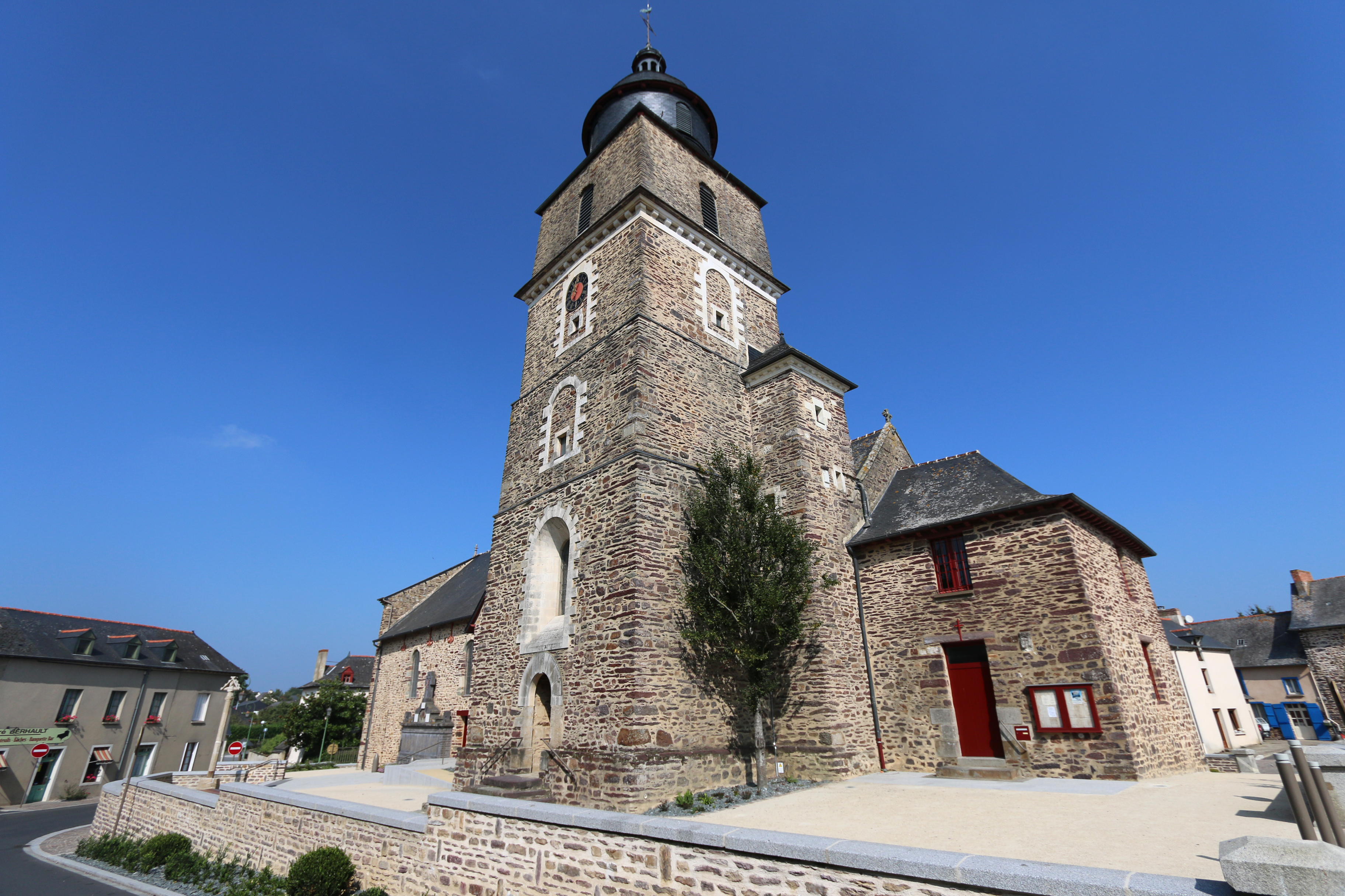 Église Saint-Malo de Bréal-sous-Montfort